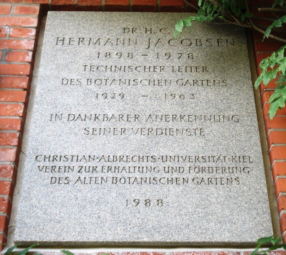 Gedenktafel für Jacobsen,_Hermann_[Botaniker] im alten botanischen Garten Kiel